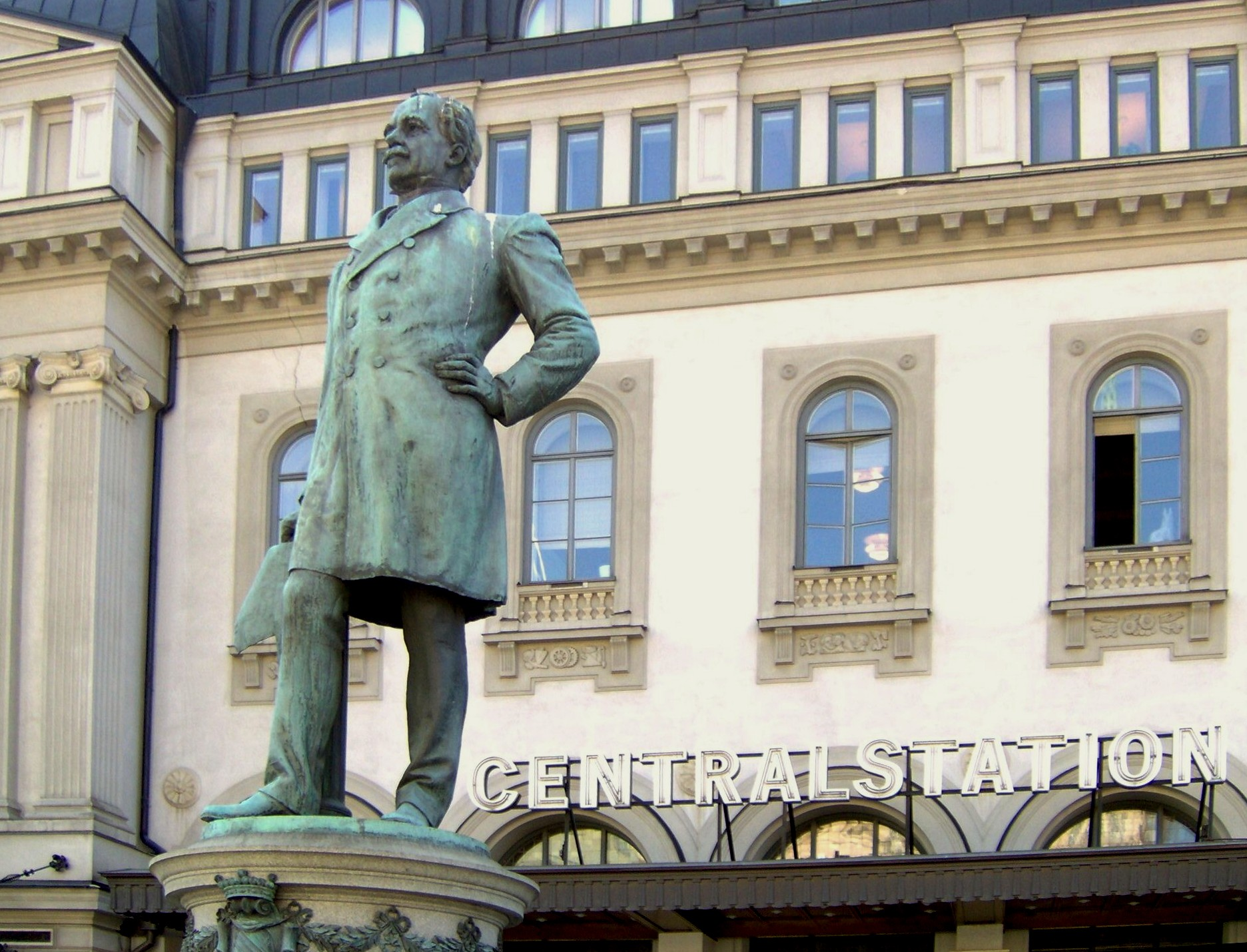 Staty utanför Stockholms Central.